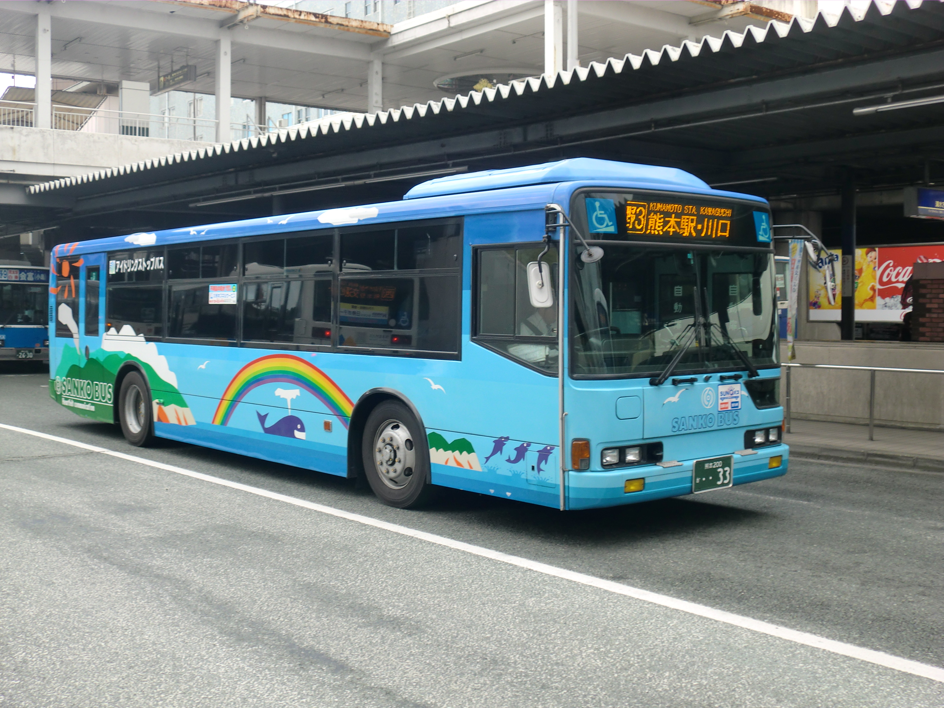 九州産交バス